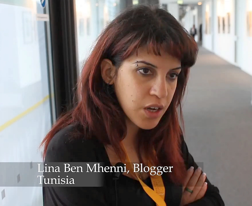 Screenshot aus Video: Lina ben Mhenni im Interview beim Deutsche Welle Global Media Forum in Bonn